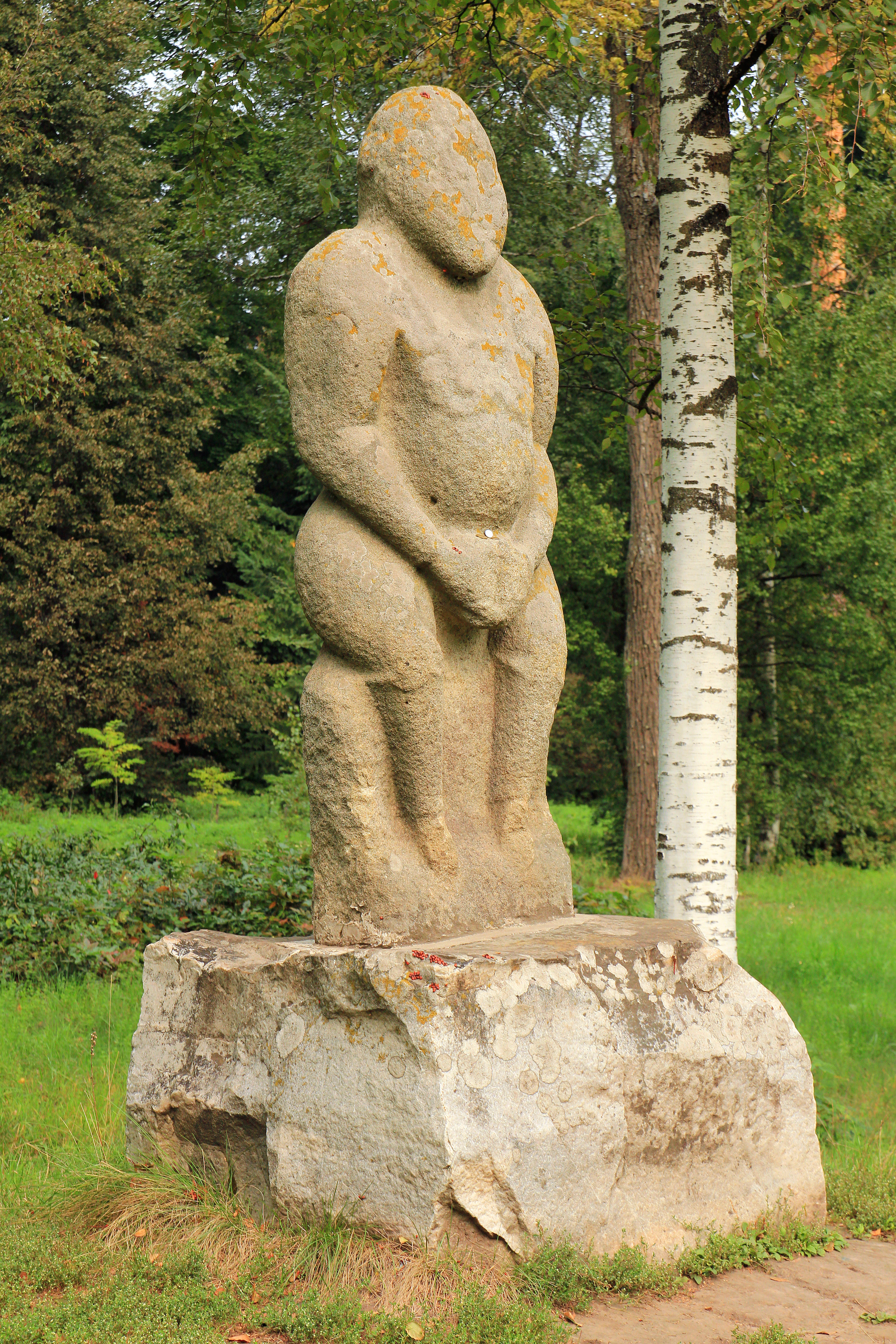 Дендропарк "Тростянець" - скульптура